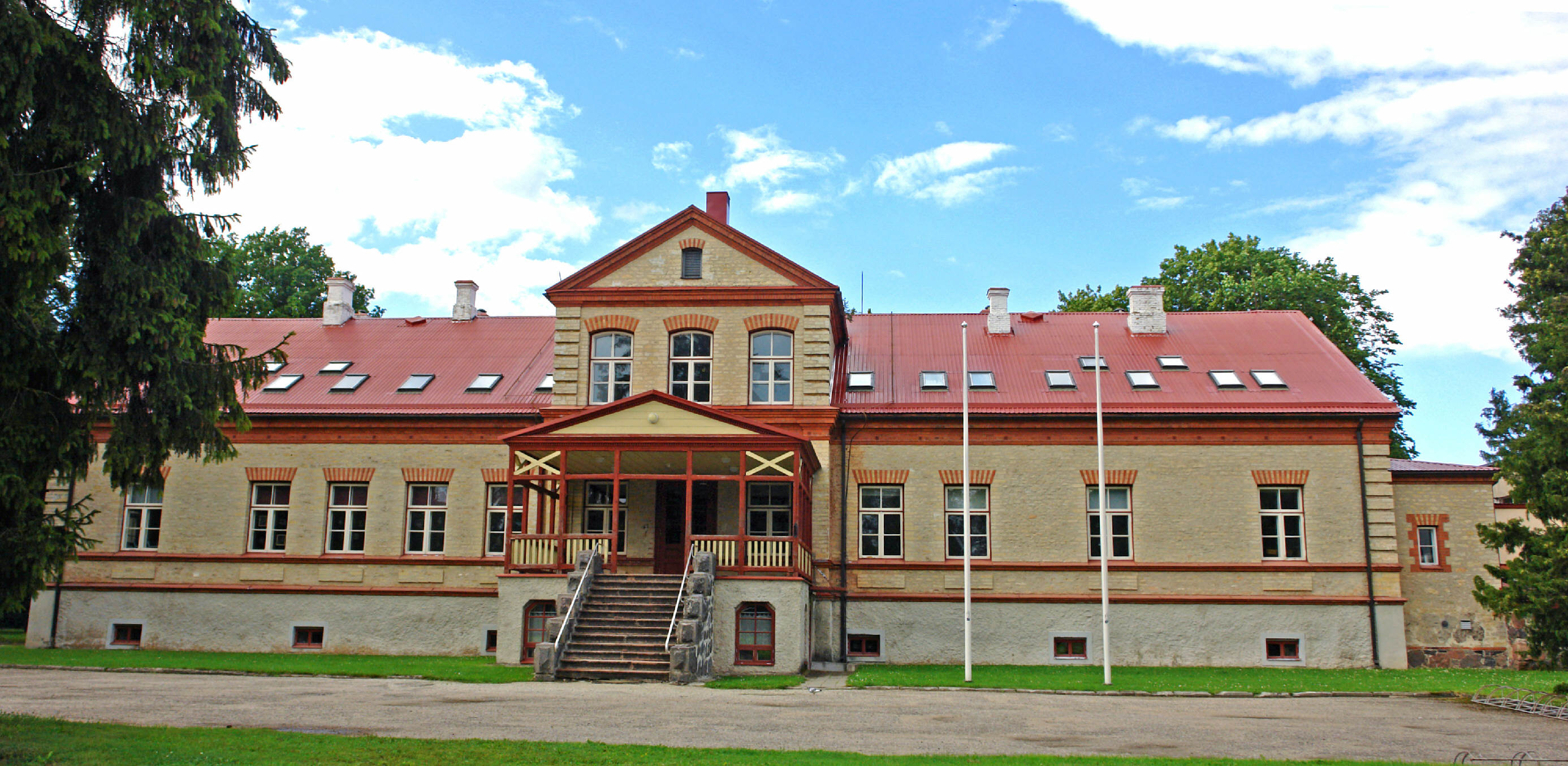 Adavere mõisa härrastemaja